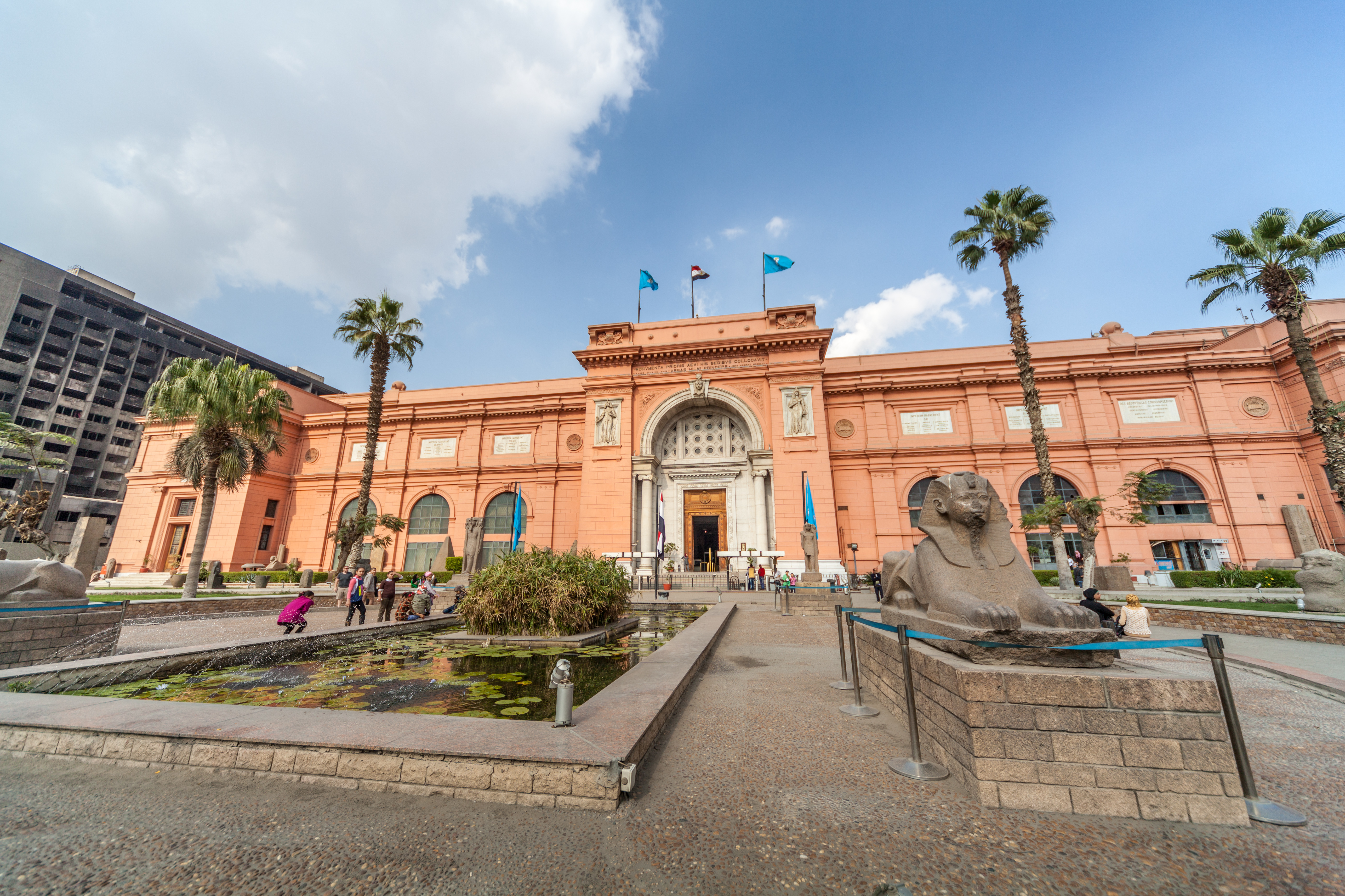 Cairo, Cairo Governorate, Egypt